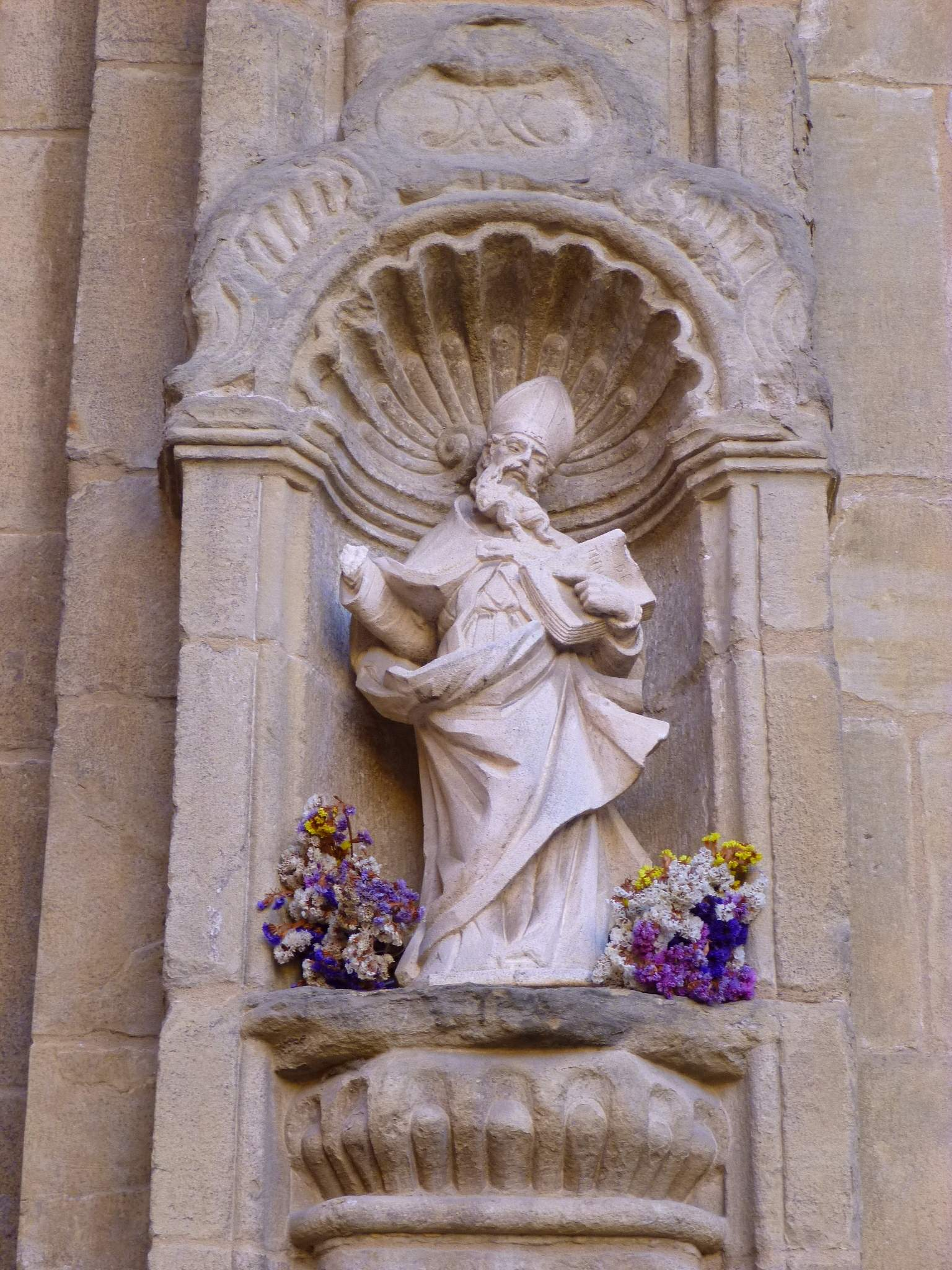 Museo de La Rioja (Palacio de Espartero), en Logroño